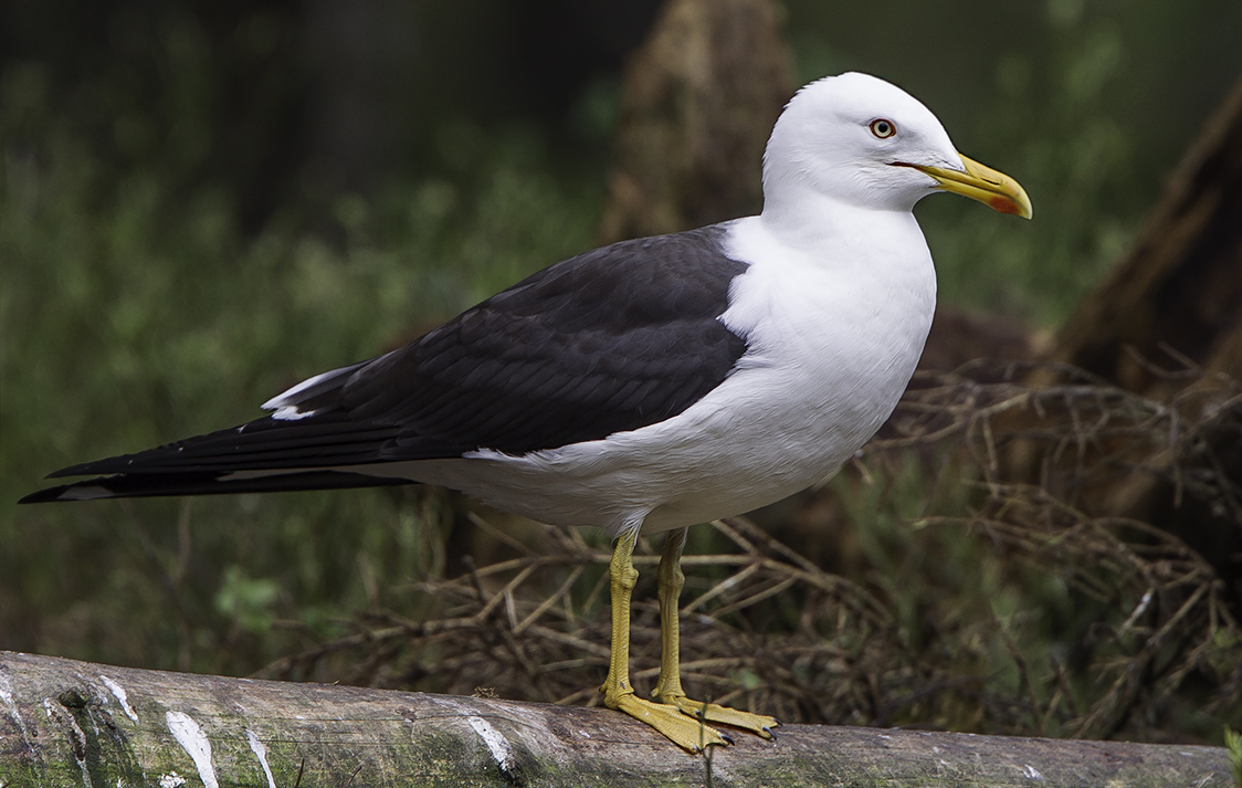 Sildemåke (Larus fuscus) er en kystbunden overflatebeitende sjøfugl som tilhører gruppen måker. Foto: Per Harald Olsen